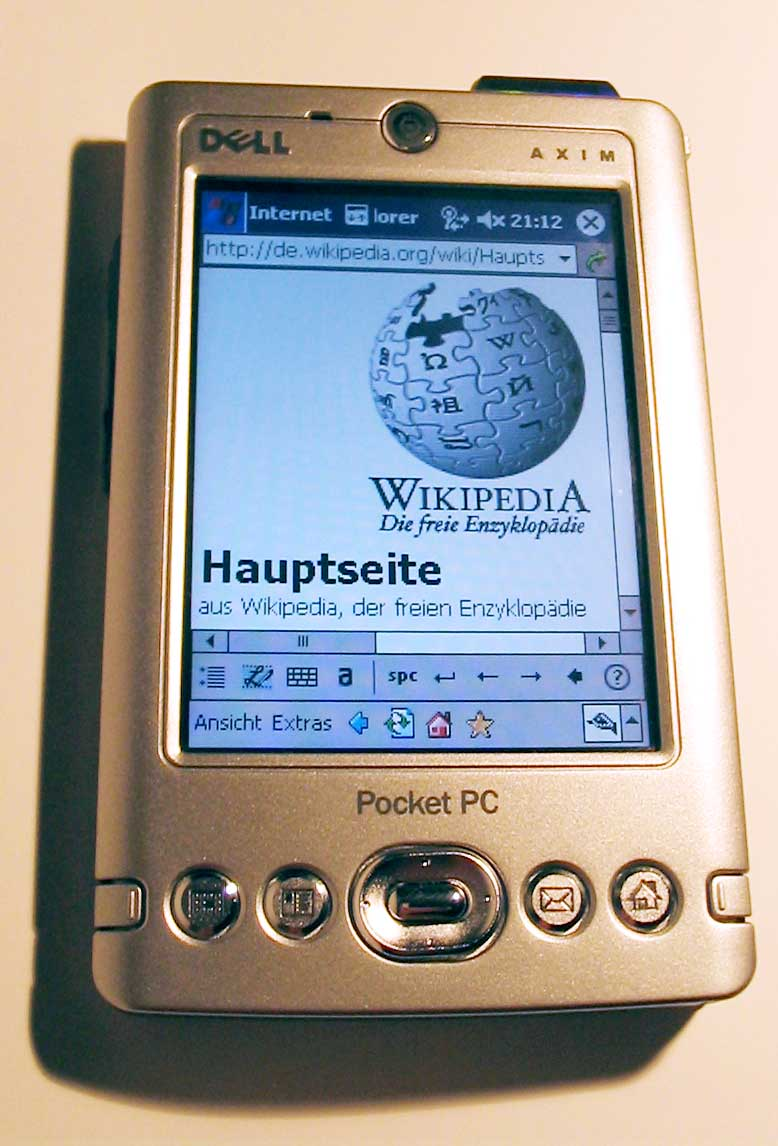 Beschreibung: Ein Dell Axim X30 Wireless-PAN/LAN 624MHz Pocket PC. Der Bildschirm zeigt die deutsche Wikipedia-Startseite, aufgerufen über den Pocket Internet Explorer und WLAN. Quelle: selbst fotografiert Fotograf / Zeichner: Felix König (King)